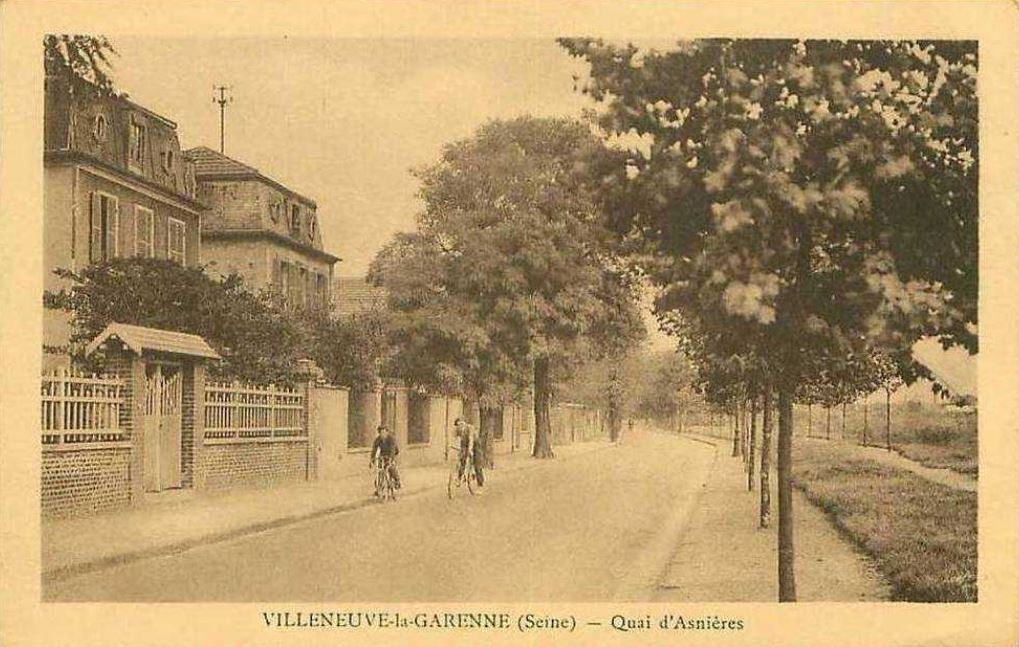 Villeneuve-la-Garenne.Quai d'Asnières.Bicyclettes